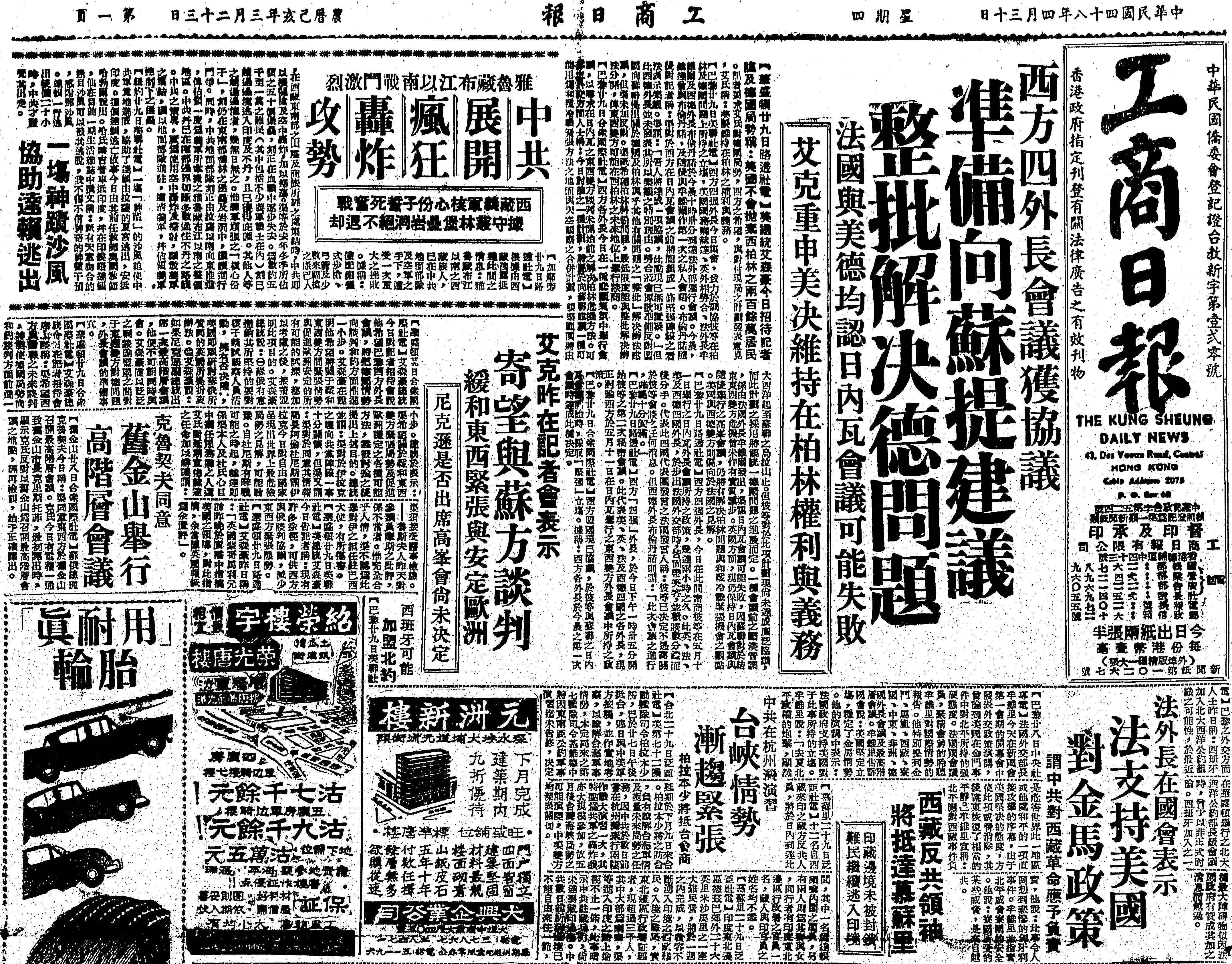 中文（香港）: 工商日報